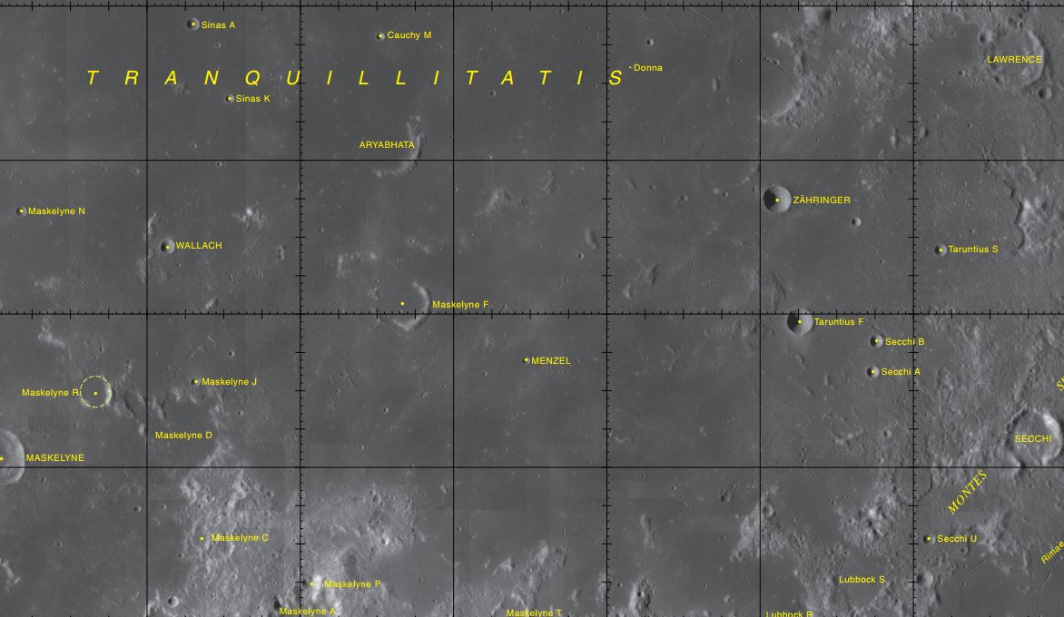 Cráter lunar Menzel. Localización. (Imagen LRO)